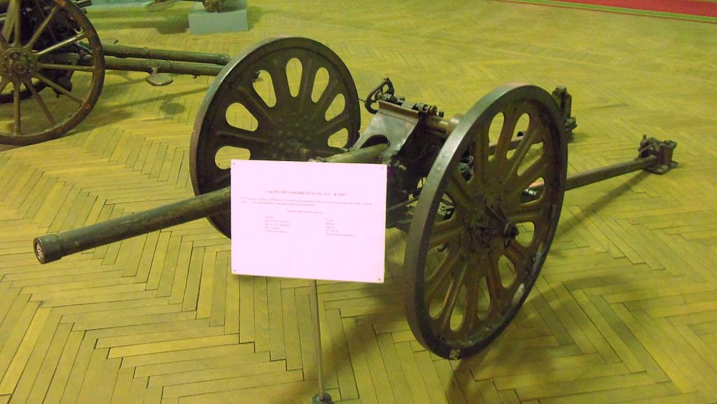 37-мм японская противотанковая пушка обр. 1934 года (2594 год от основания Японии) в Военно-историческом музее артиллерии, инженерных войск и войск связи в Санкт-Петербурге